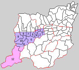 徳島県麻植郡の町村制時点の町村。